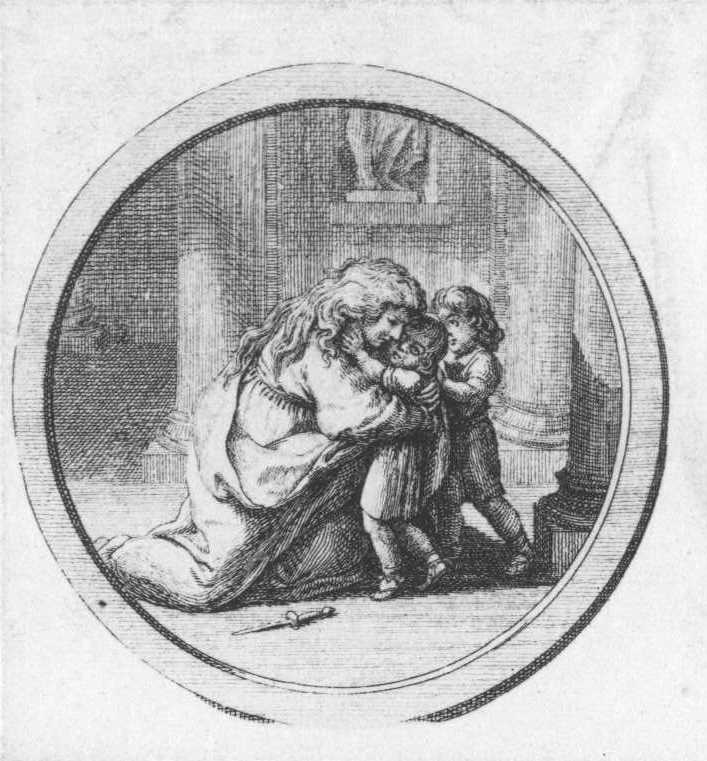 Titelvignette zu Gotter's Medea. (Beschreibung lt. Quelle)